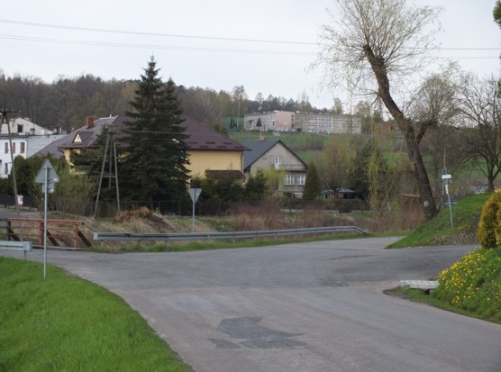 Skrzyżowanie koło kościoła parafialnego pw. Michała Archanioła w Zebrzydowicach